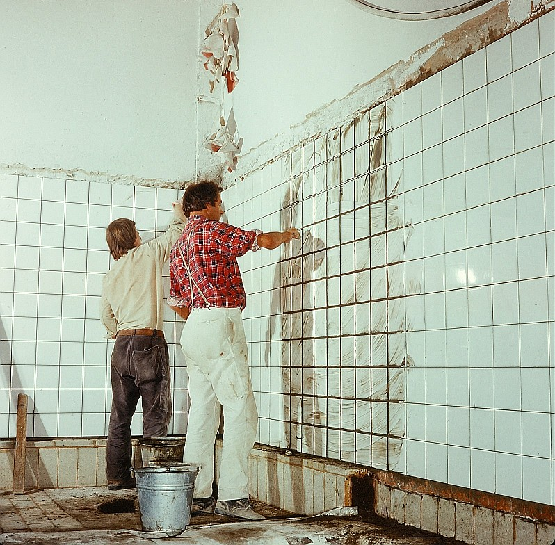 Original image description from the Deutsche FotothekFliesenleger